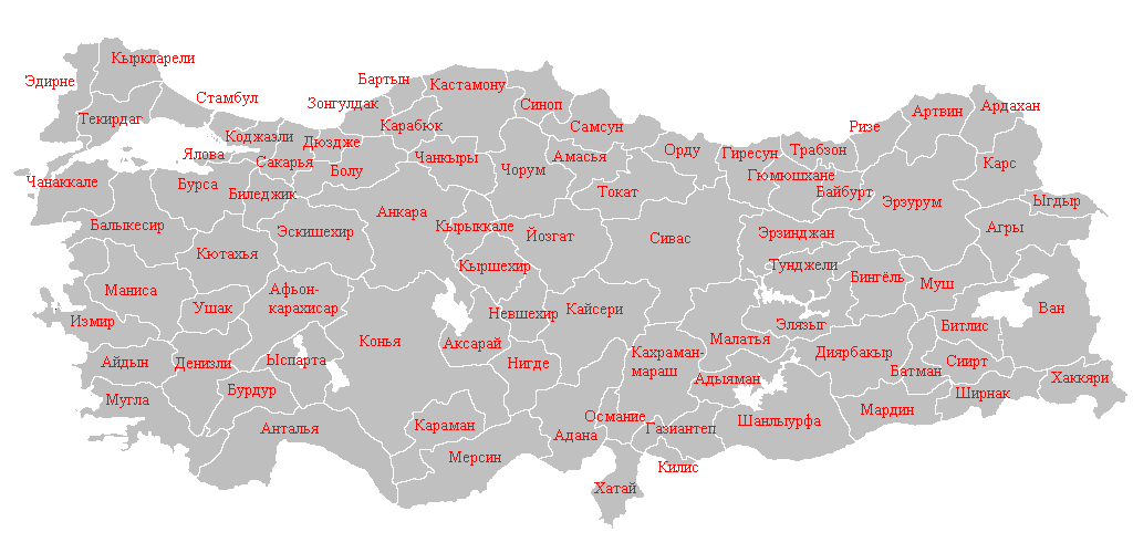 Илы (провинции) Турции